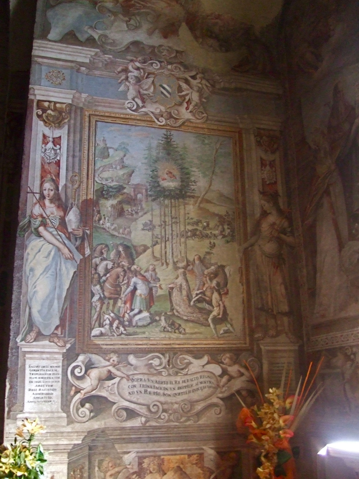 Tableau de Francesco Nasini : "Chasse du duc Ratchis" à l'abbaye San Salvatore à Abbadia San Salvatore